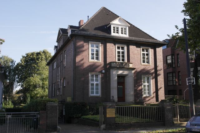 Haus Pape in Bremen, Hartwigstraße 37Das abgebildete Objekt ist ein geschütztes Kulturdenkmal in der Freien Hansestadt Bremen, mit der Nr. 1239 beim Landesamt für Denkmalpflege registriert.